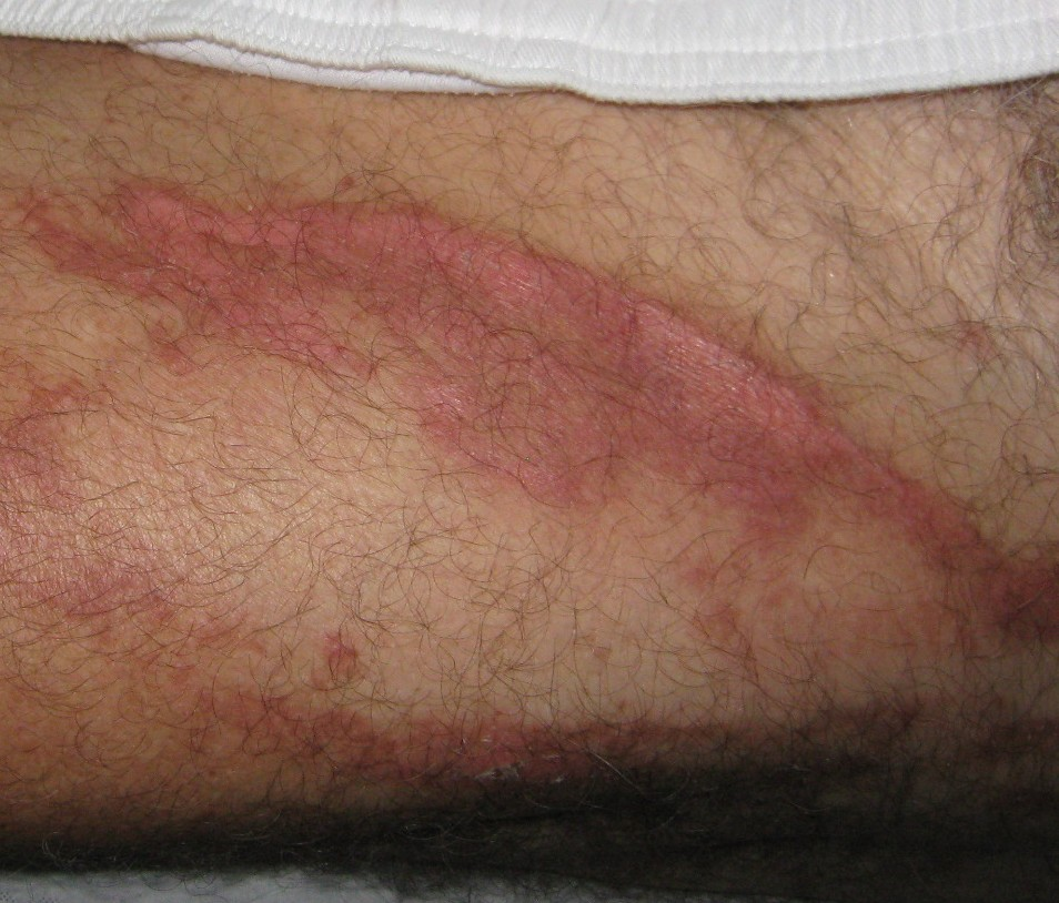 brulure par un mancenillier face postérieure de la cuisse, 3 semaines après contact lors d'une randonnée